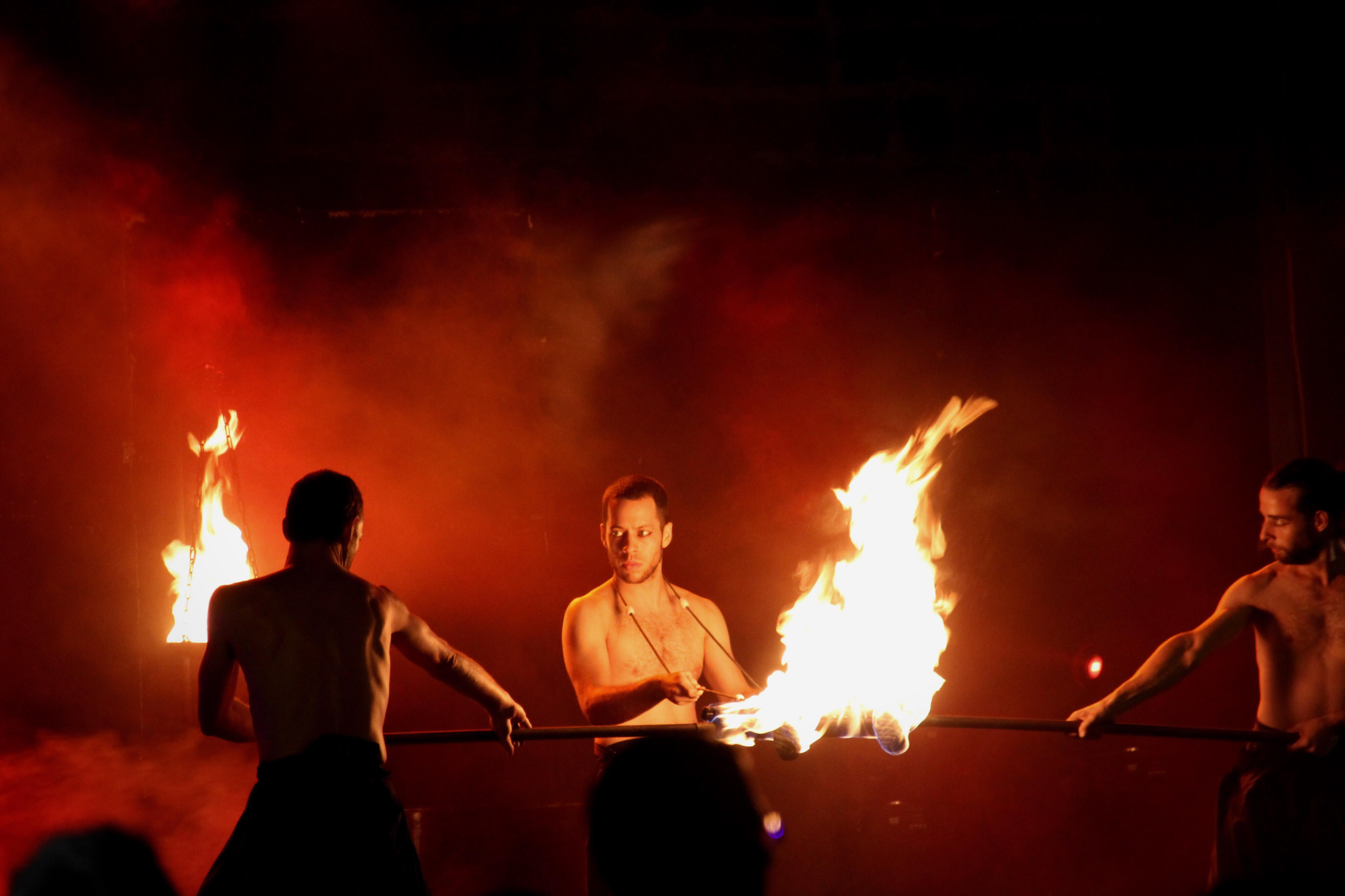 הופעה בפסטיבל עכו 2016